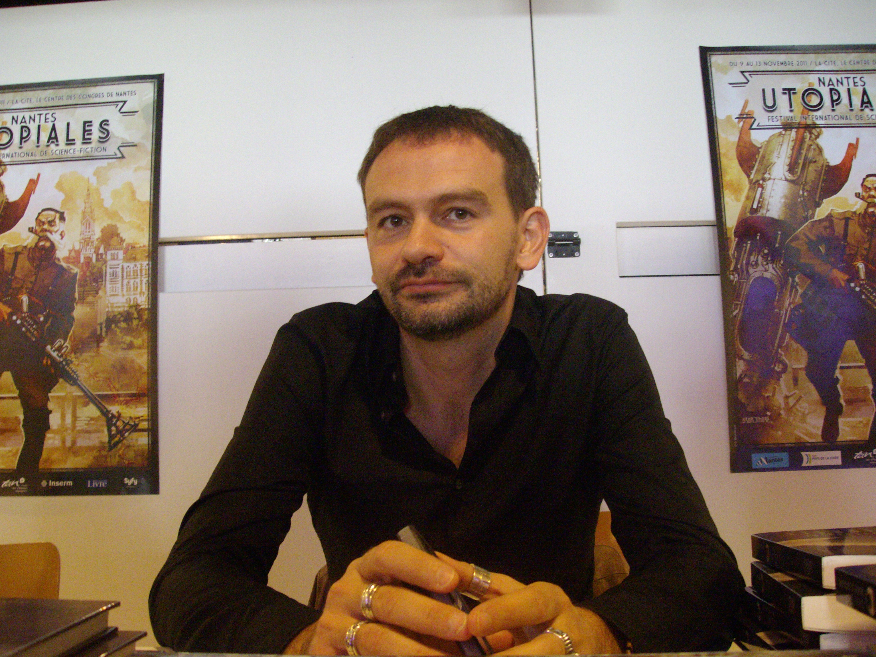 Raphaël Granier de Cassagnac aux Utopiales 2011